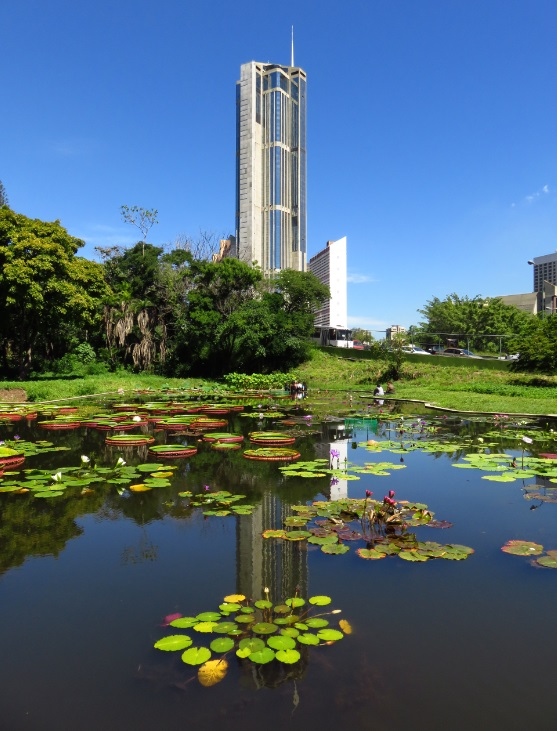 3.Laguna Venezuela, Jardín Botanico de la UCV y parque Central en Caracas, Venezuela